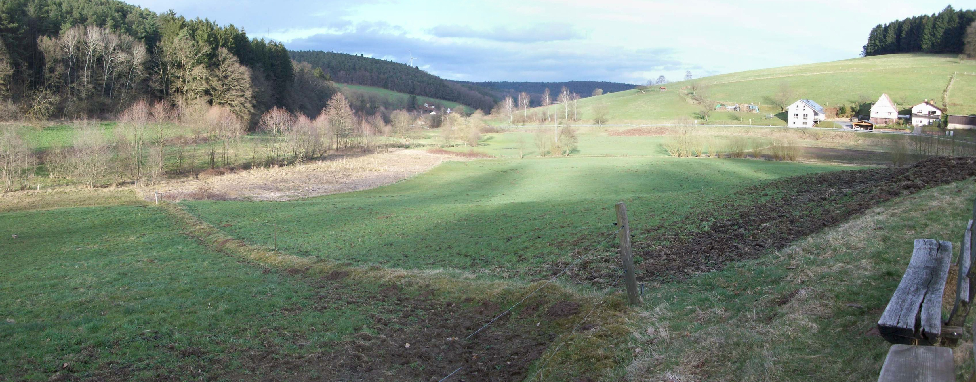 Panorama ins Tal: Lage der abgegangenen Burg Güttersbach zwischen Mösselbach (links) und Güttersbach (rechts) nördlich des Mösselbachweges nördlich des Ortsausgangs Güttersbach